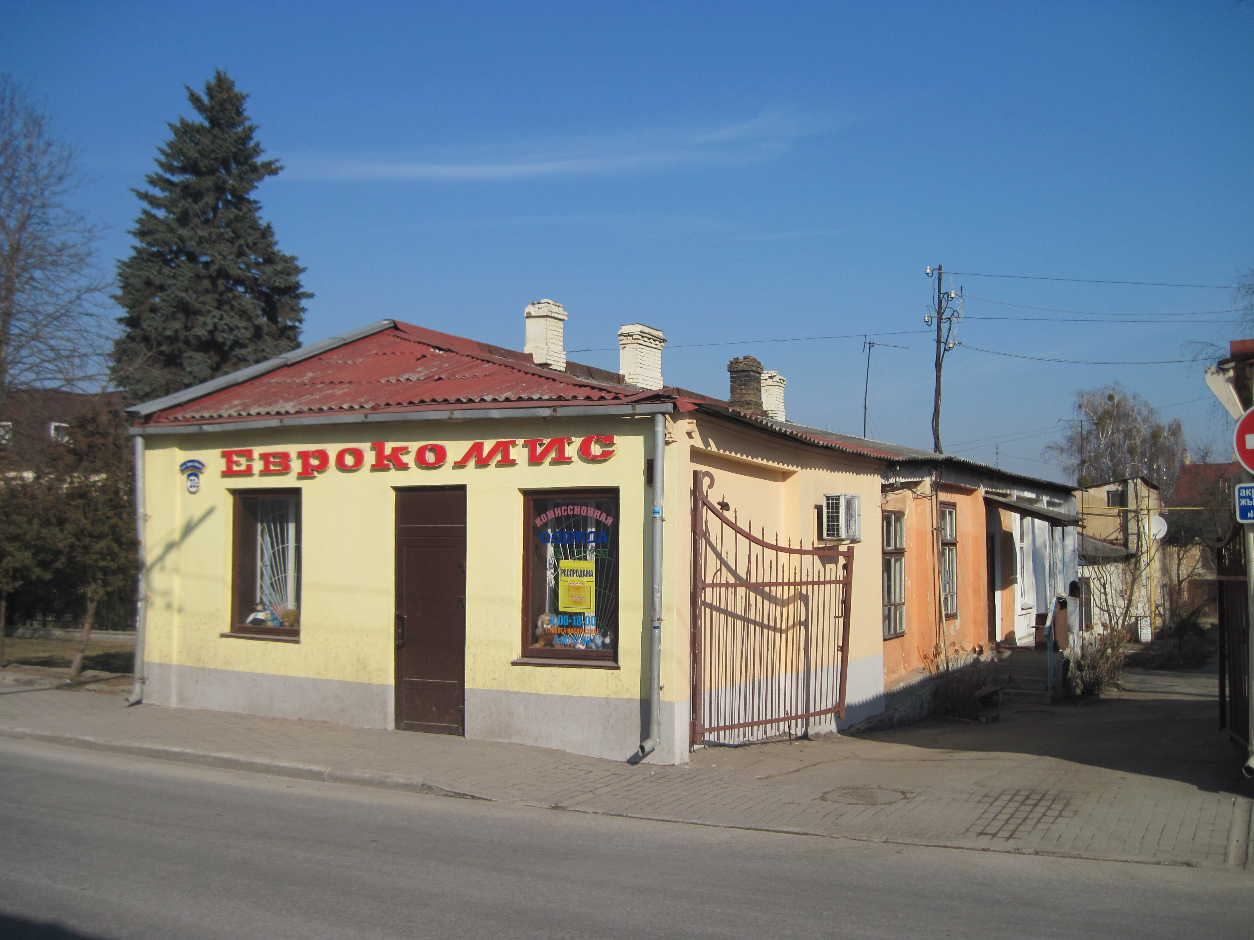 Забудова гістарычнага цэнтра Гродна. Вуліца К. Маркса, 28А